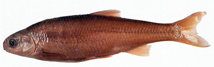 loina, madrilla del Júcar o luina